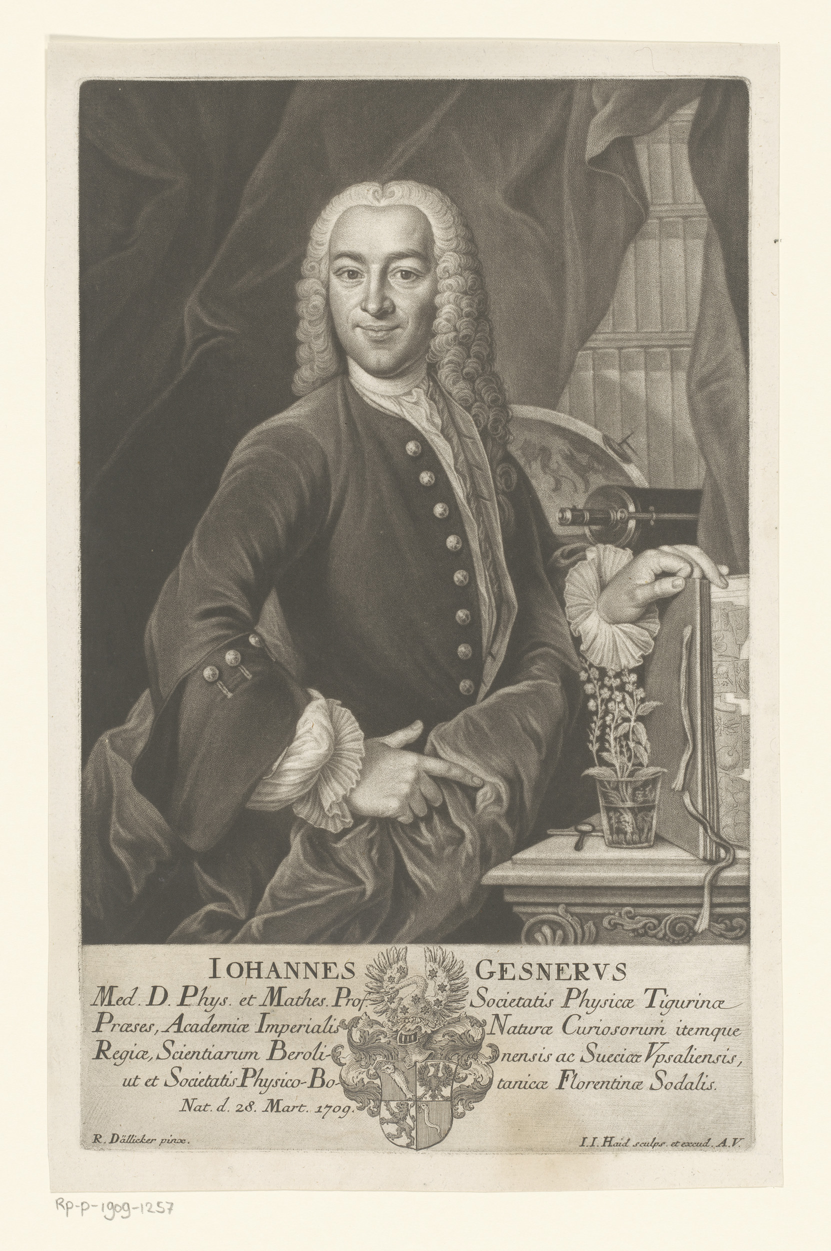 IdentificatieTitel(s): Portret van Johannes GessnerObjecttype: prent Objectnummer: RP-P-1909-1257Catalogusreferentie: HAB A 7680Opschriften / Merken: verzamelaarsmerk, verso, gestempeld: Lugt 2228VervaardigingVervaardiger: prentmaker: Johann Jacob Haid (vermeld op object)naar schilderij van: Johann Rudolf Daelliker (vermeld op object)uitgever: Johann Jacob Haid (vermeld op object)Plaats vervaardiging: AugsburgDatering: 1752Materiaal: papier Techniek: mezzotint / etsenAfmetingen: plaatrand: h 319 mm × b 200 mmToelichtingPrent gebruikt voor: Brucker, Jacob. Bildersal heutiges Tages lebender und durch Gelahrtheit berühmter Schrifftsteller. Augsburg: Johann Jacob Haid, 1752.OnderwerpWat: historical personsarmorial bearing, heraldrybookshelvesherbariumplanten; begroeiingarmillary sphere, skeleton celestial globeWie: Johannes GessnerVerwerving en rechtenVerwerving: aankoop 1909Copyright: Publiek domein